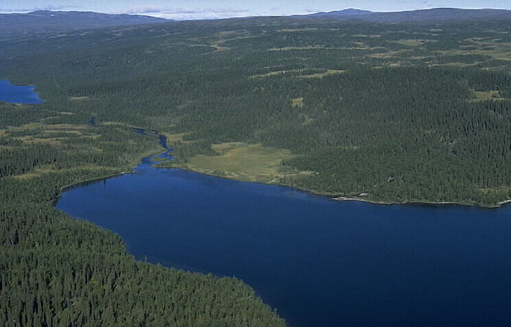 Motiv: Maskien Nyckelord: Flygbilder, Riksintressen Kategori: Fjällbygd Maskien